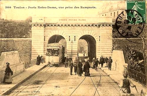 Porte Notre Dame, Tolon, detruite en 1923